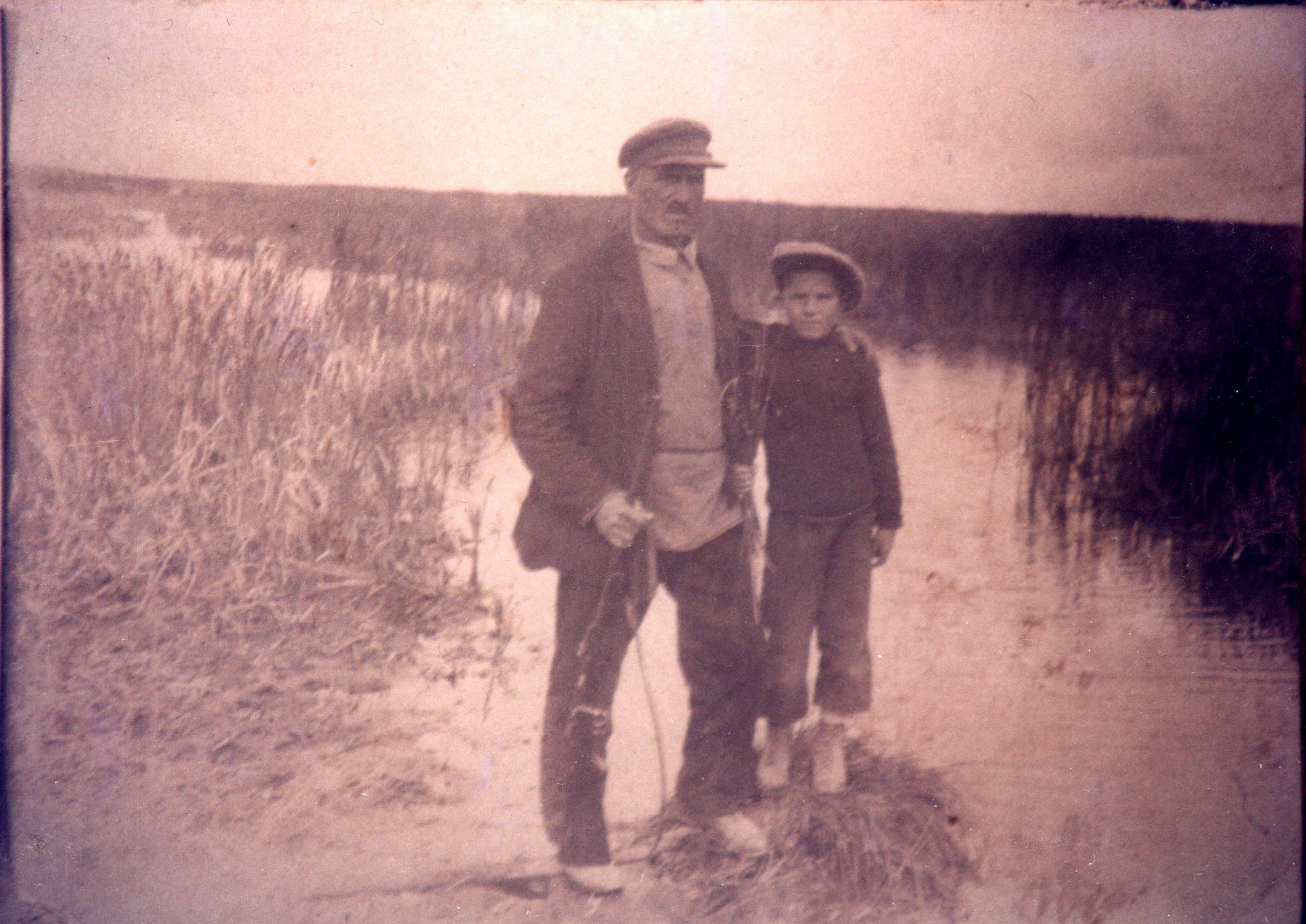 Фрол Воронцов и сын Дмитрий